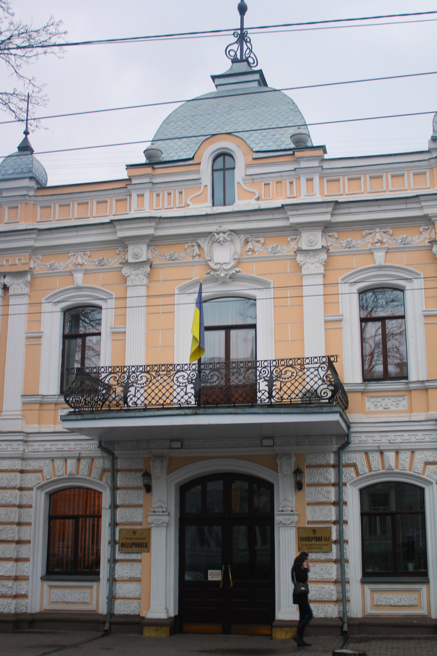 Сумська філармонія